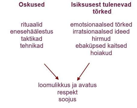 Henn Mikkini joonis psühholoogilise kontakti kahest poolest